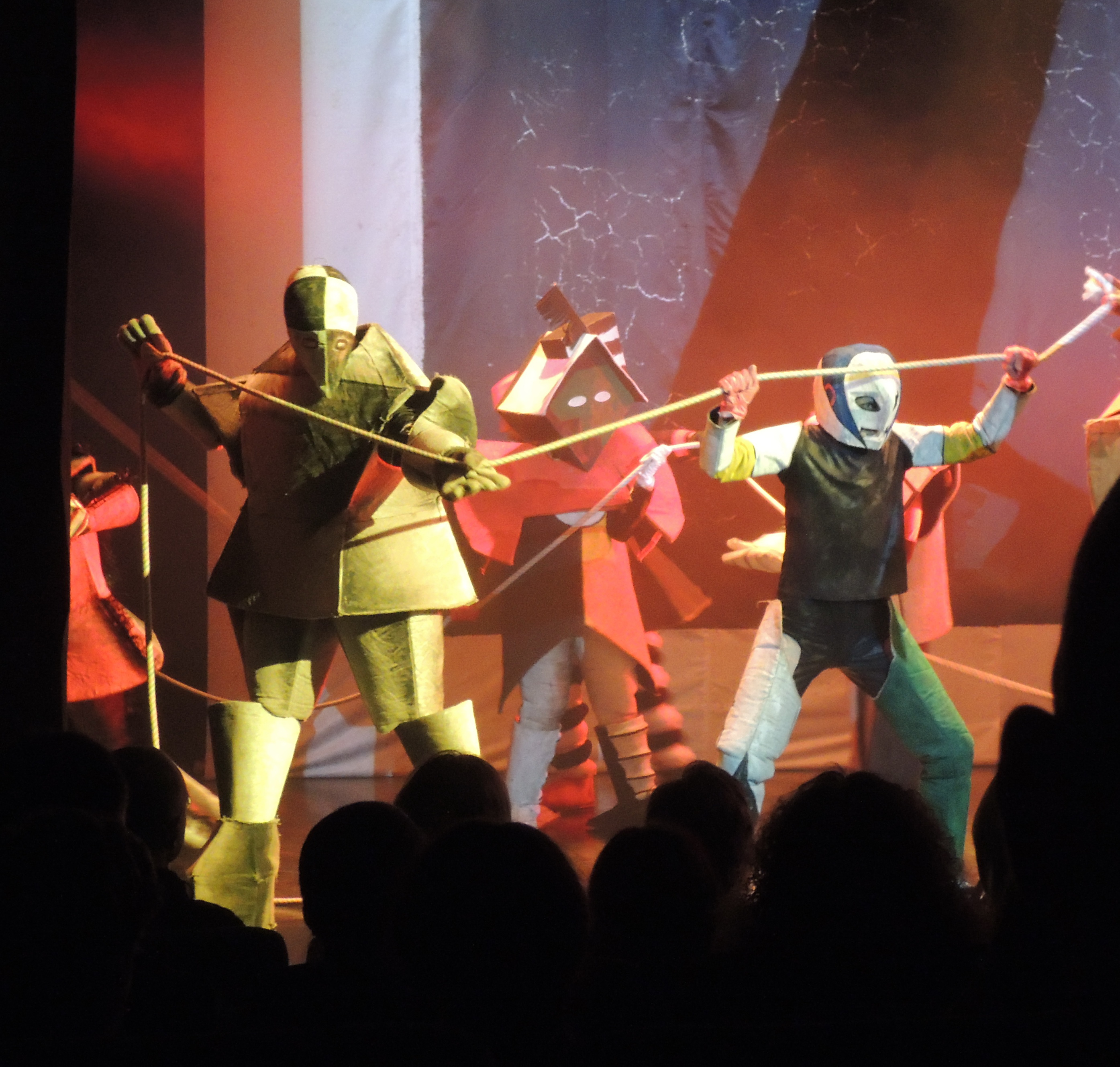 Победа над Солнцем, театр Стаса Намина, 2014